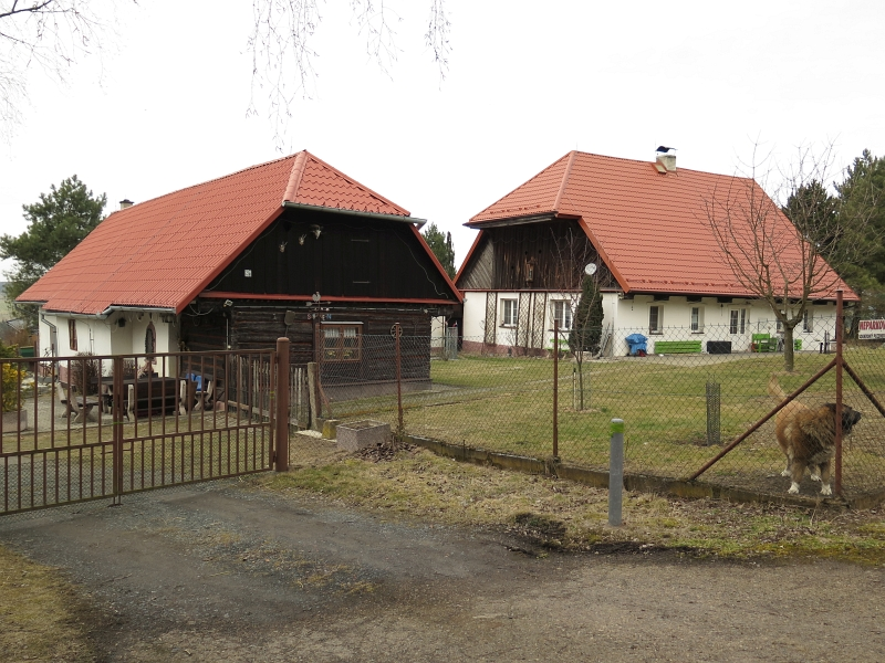 Kovárna Hvížďalka, za obcí, rozcestí jižním směrem ke Šťáhlavům 24, Lhůta (okres Plzeň-město).